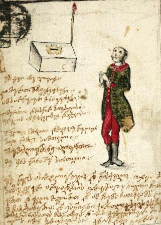 დავითიანი (S-1598)